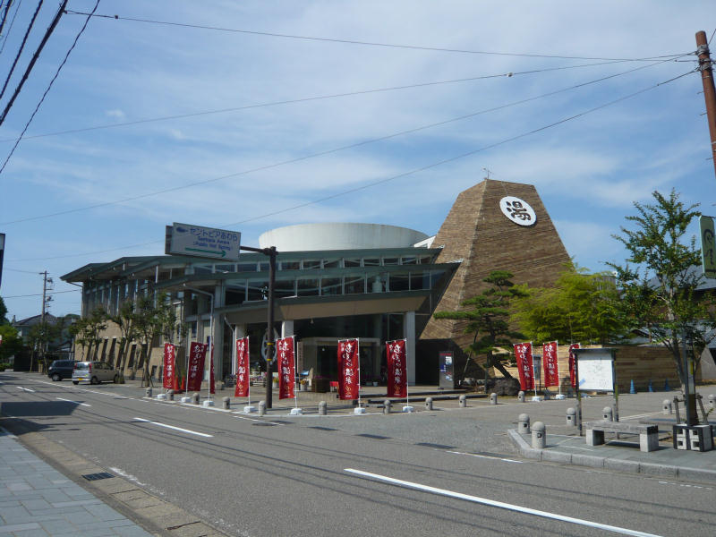 芦原温泉セントピア（総湯）